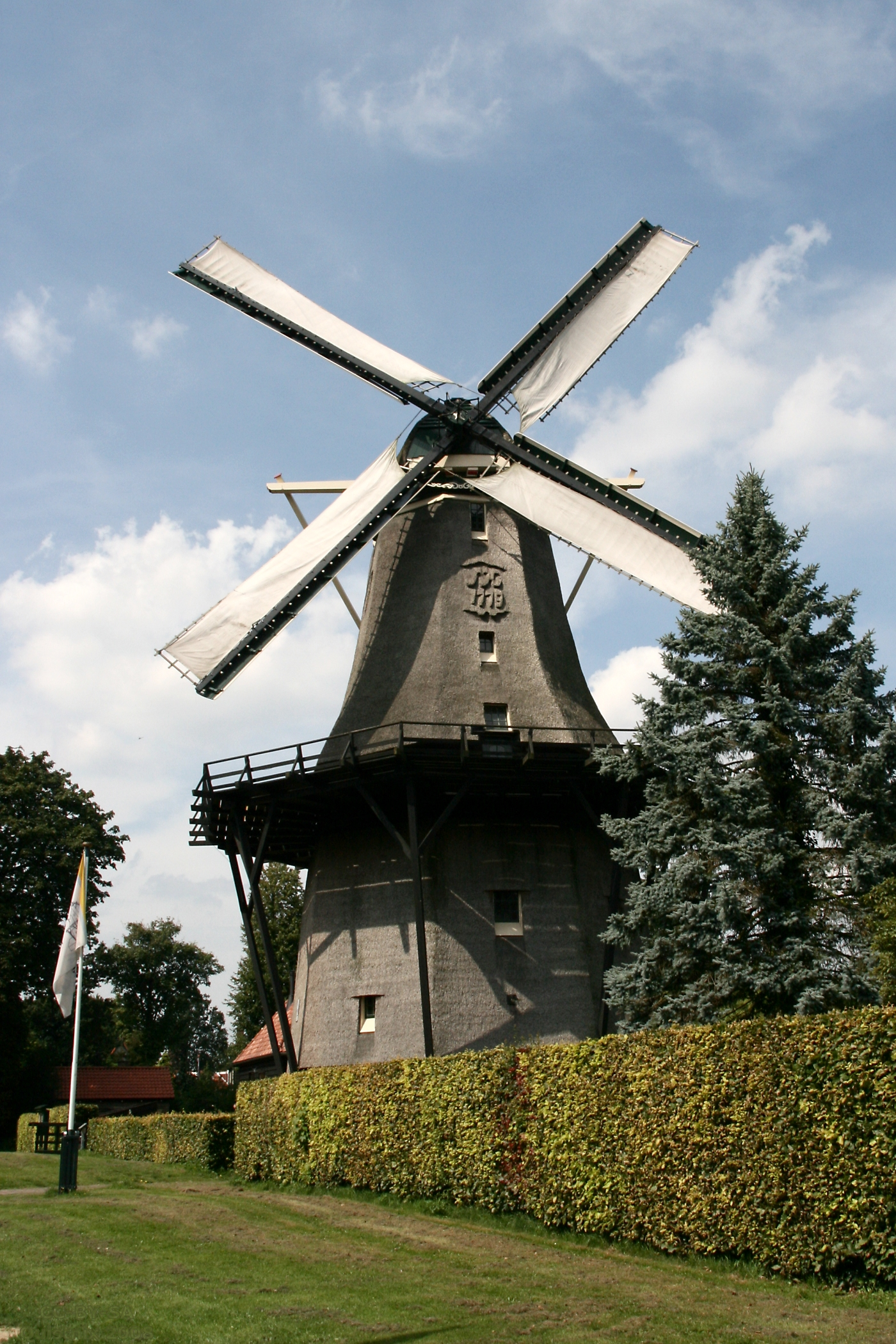 Santpoort: molen De zandhaas